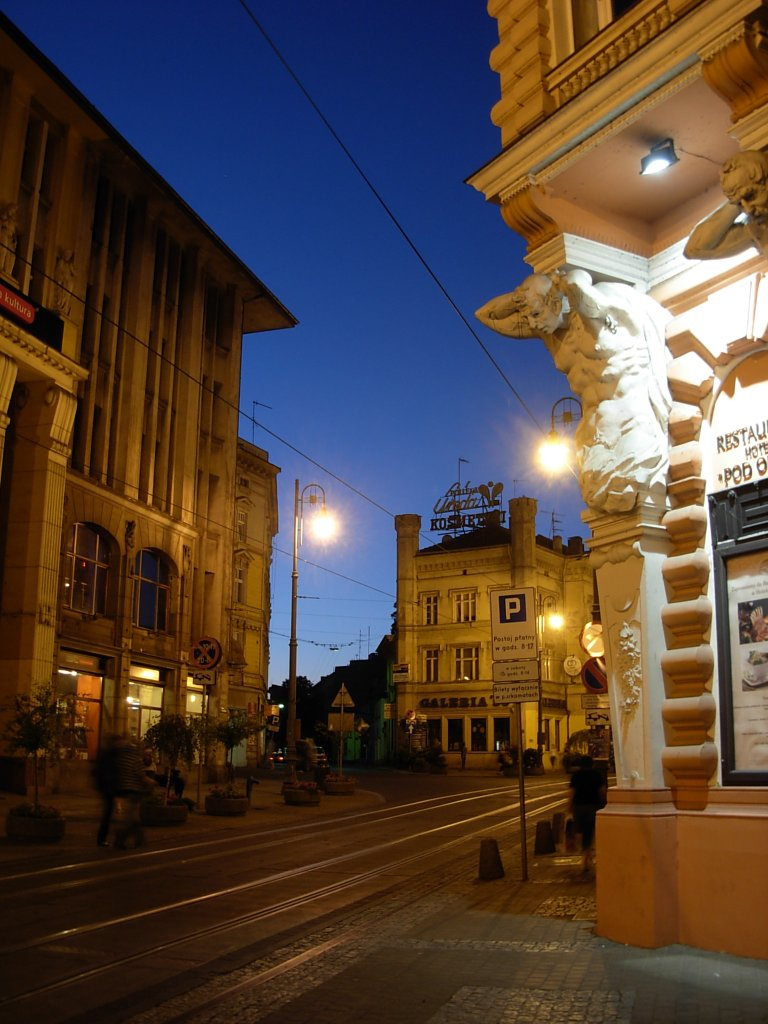 Ulica Gdańska w Bydgoszczy